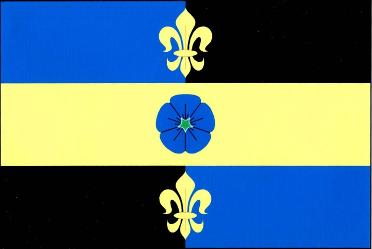 vlajka, Sudkov, okres Šumperk